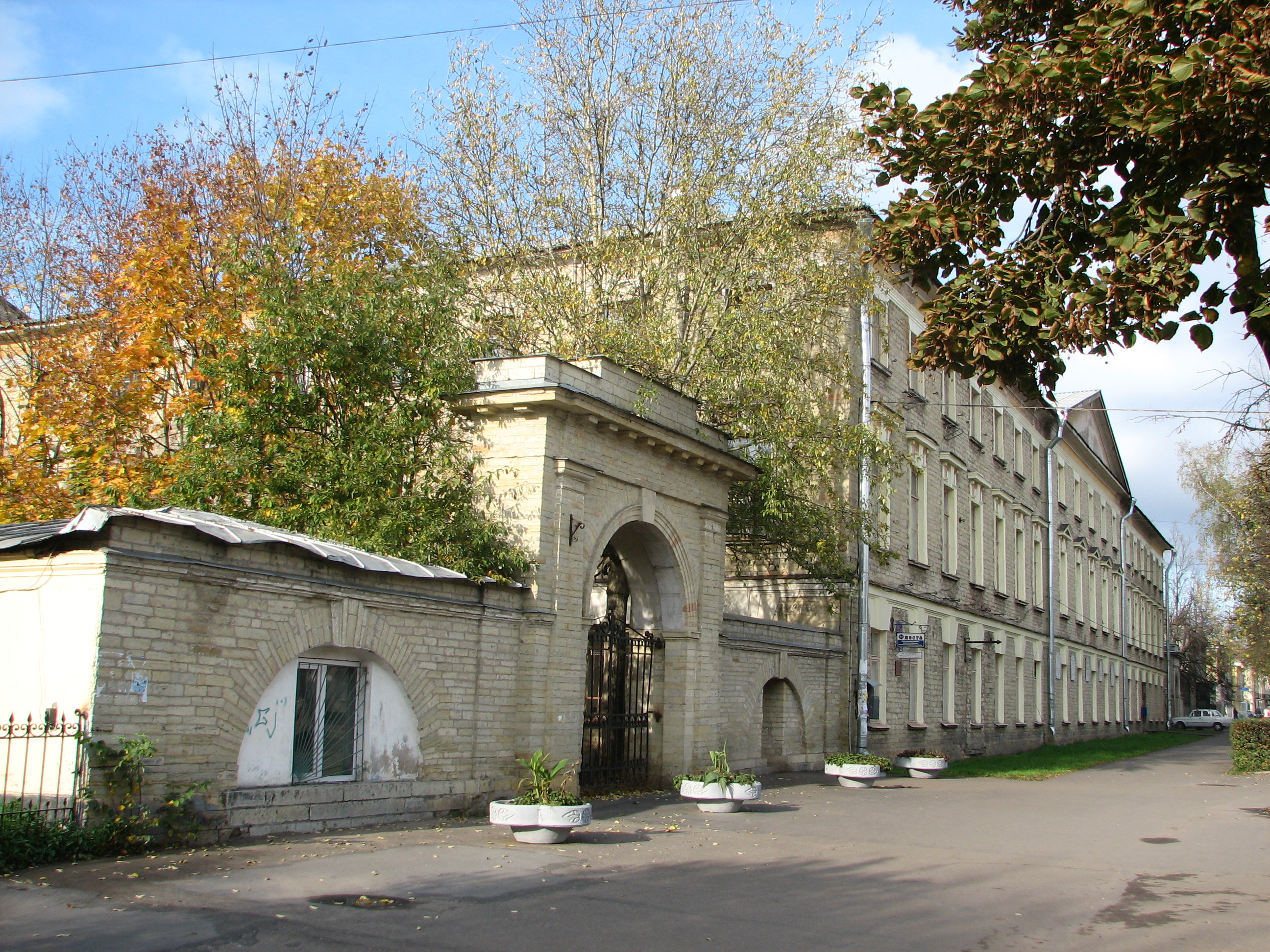 Здание Сиротского института в Гатчине